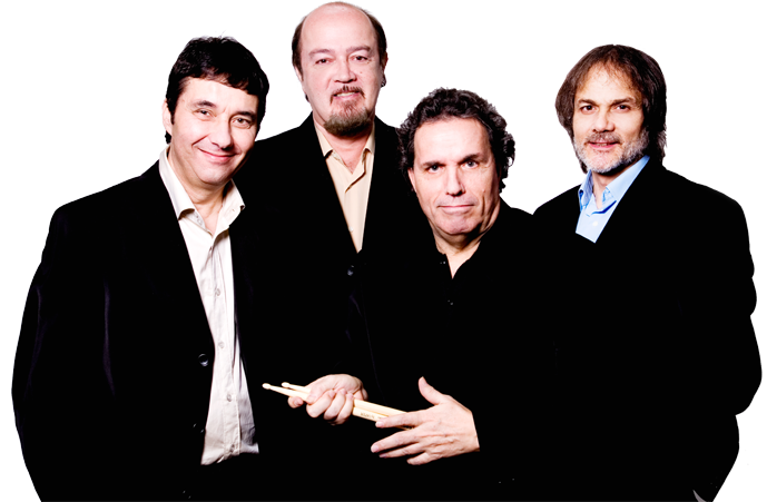 Los Brincos